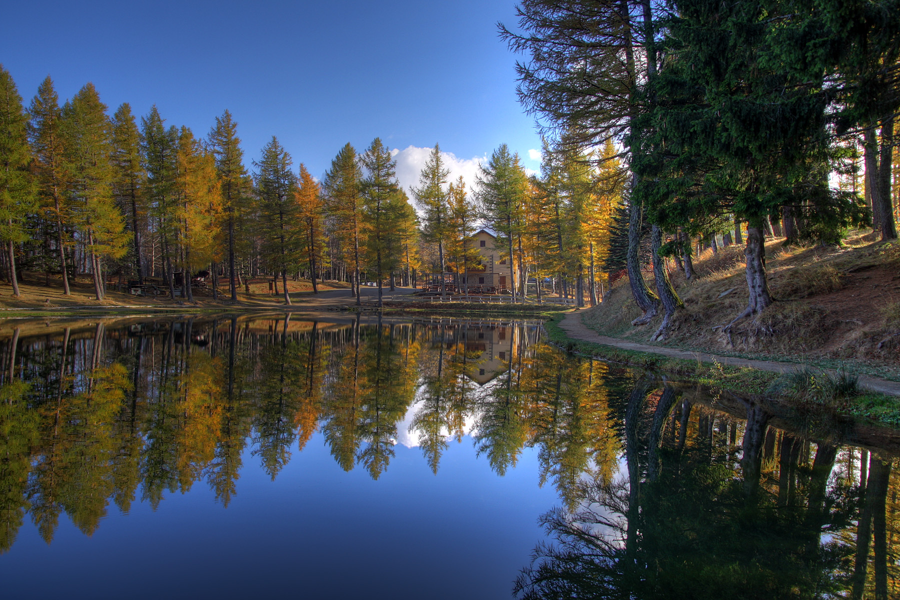 Sestola (MO)